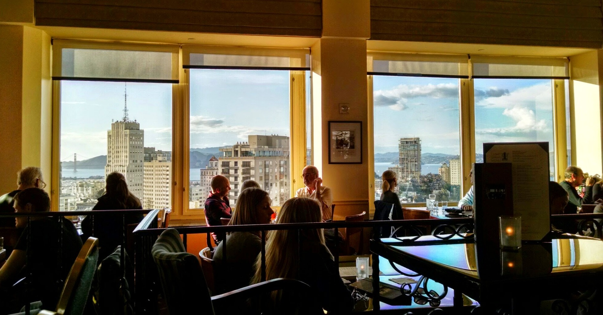 San Francisco, California